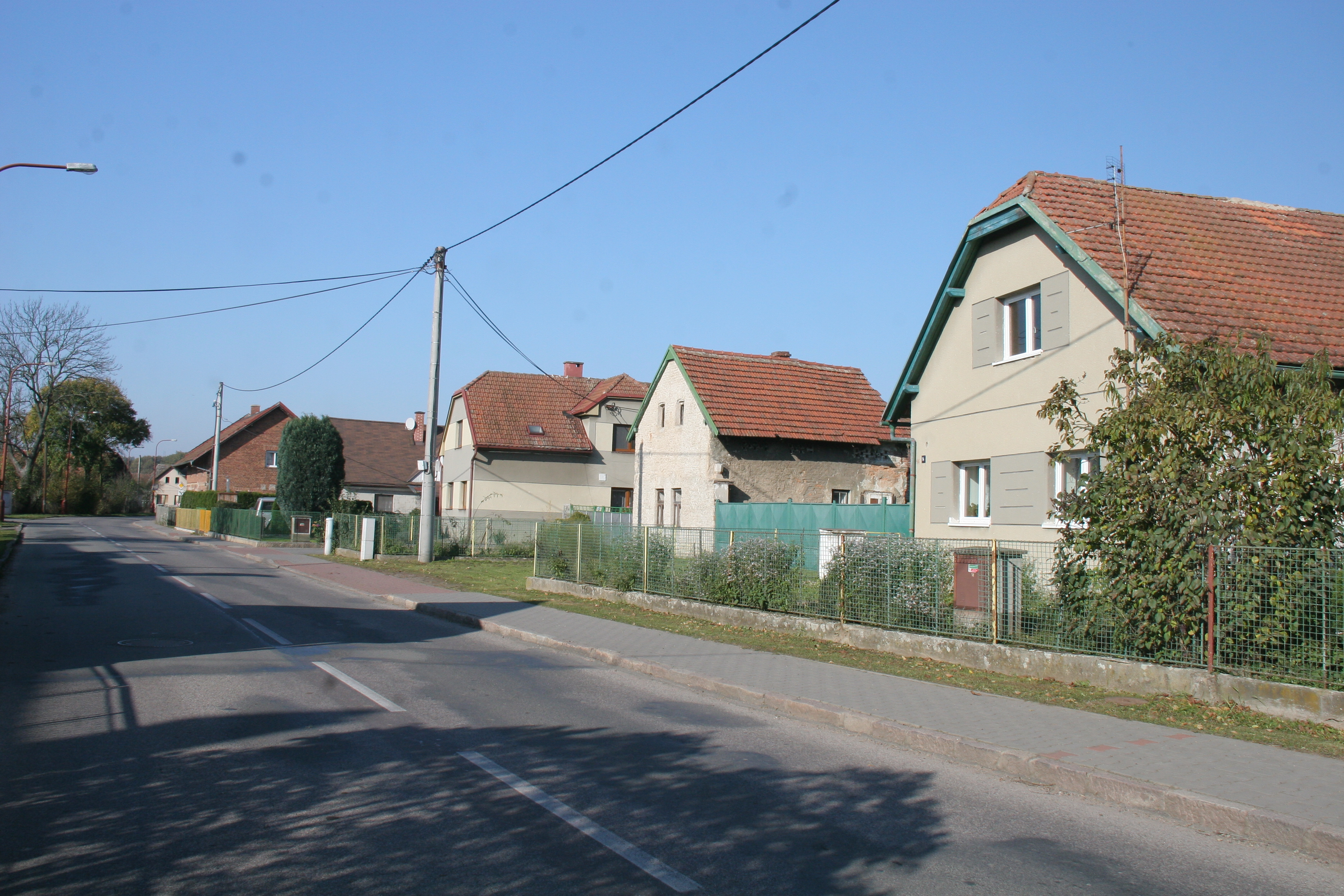 Rzy čp. 14